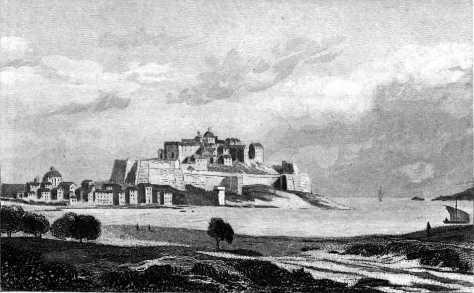 Image en provenance du livre : Eusèbe Girault de Saint-Fargeau, Guide pittoresque du voyageur en France, contenant la statistique et la description complète des quatre-vingt-six départements, orné de 740 vignettes et portraits gravés sur acier, de quatre-vingt-six cartes de départements et d'une grande carte routière de la France, par une Société de gens de lettres, de géographes et d'artistes, Paris, F. Didot frères, 1838, 6 volumes in-8° (BNF : 8-L25- 46). Volume III Didot frères, 1838. Route de Paris à Nice traversant les départements de l'Isère, des Hautes-Alpes, des Basses-Alpes et du Var. auteurs dessins : Rauch (ou autre) auteurs gravures : Skelton fils, Schroeder, Bishop (ou autre)